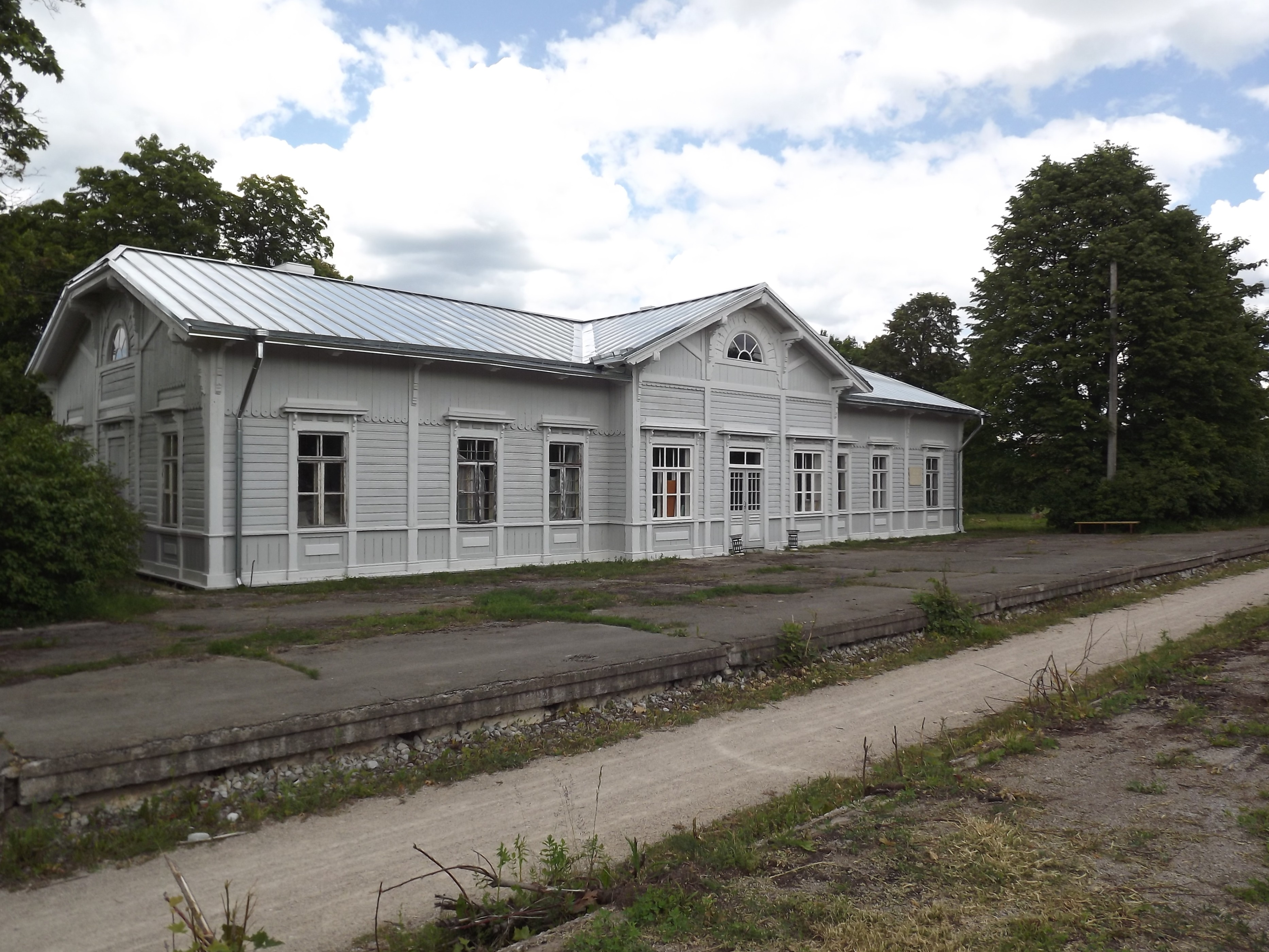 Endine Risti raudteejaam.